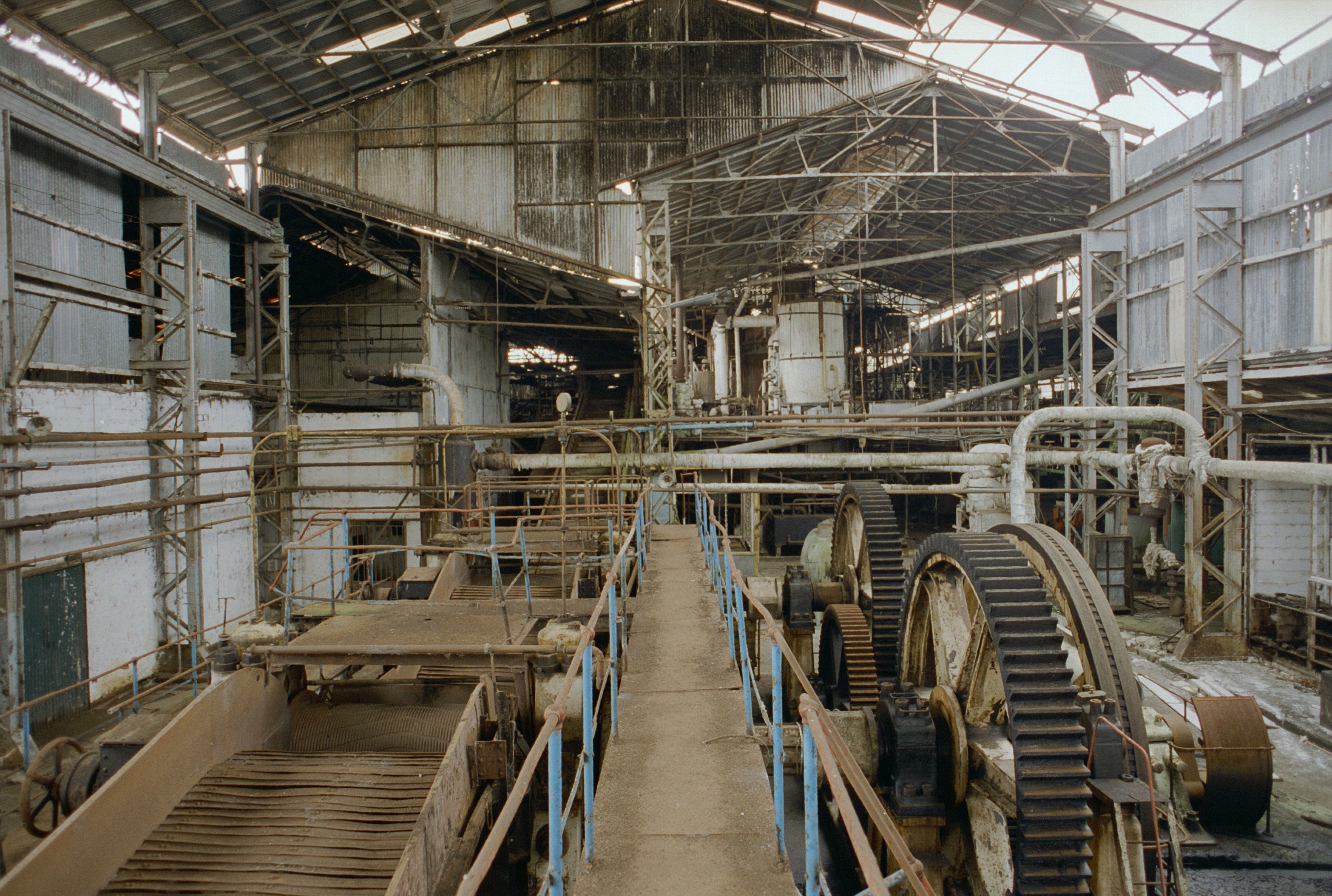 Suikerplantage Mariënburg: Overzicht van één van de fabriekshallen van de oude suikerplantage in Mariënburg (opmerking: Suriname reis Loek Tangel)